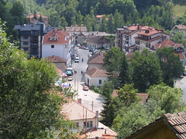 Panorama Crne Trave